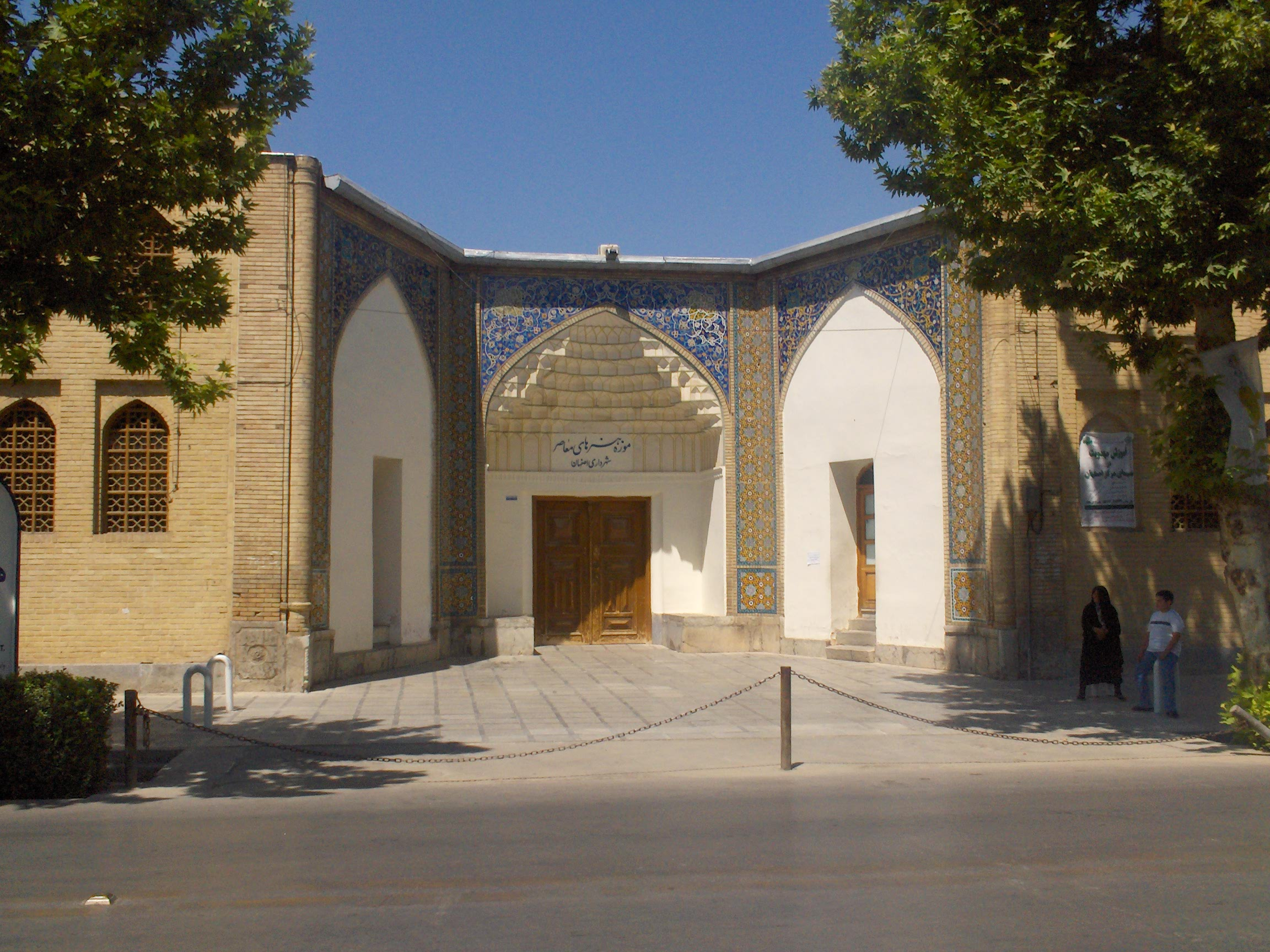 Isfahan Modern Art (Contemporary Art) Museum, Persia (Iran), taken by Pejman Akbarzadeh, 2006.